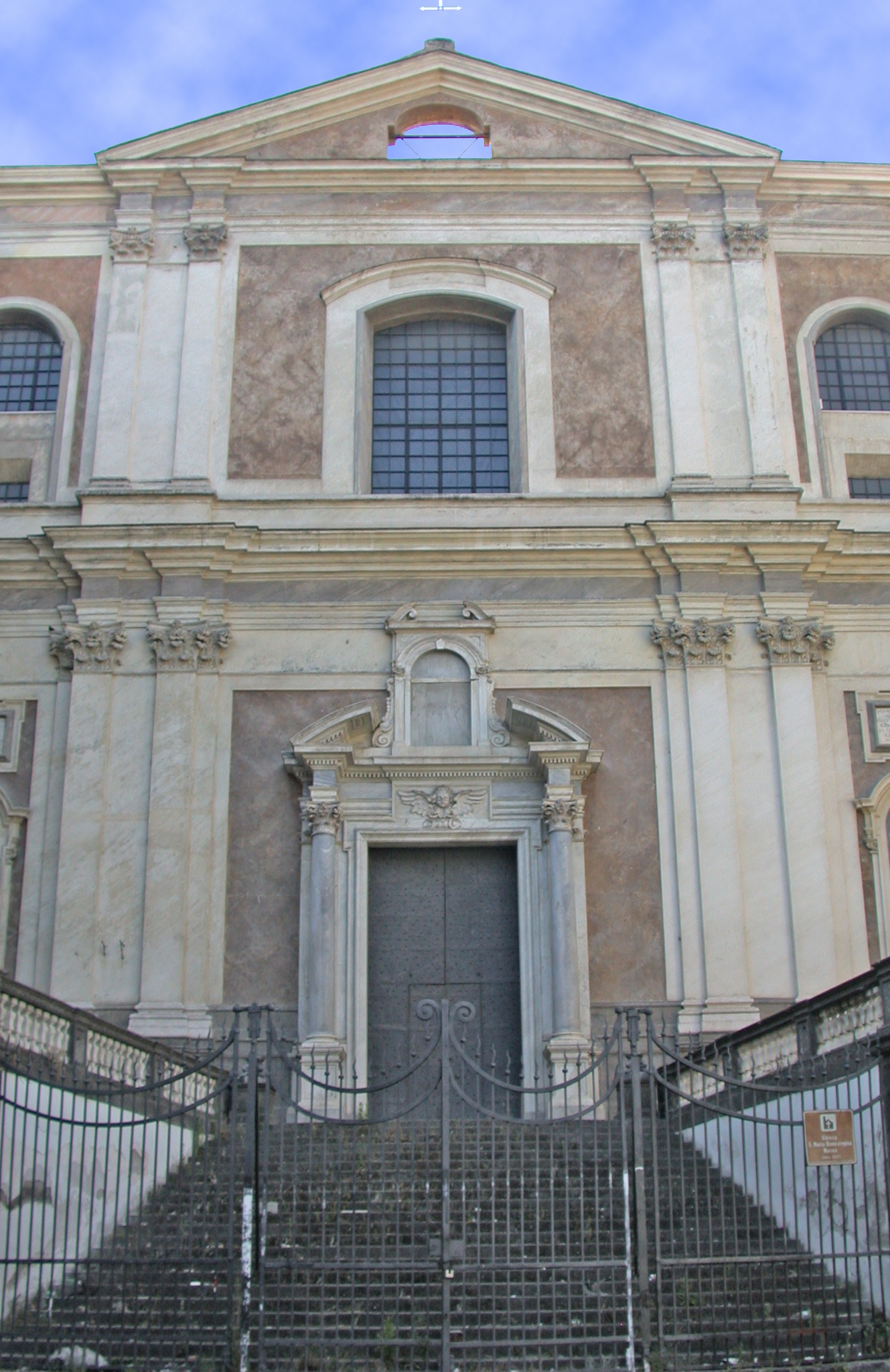 Italia, regione Campania, Napoli, chiesa di Santa Maria Donnaregina, facciata, parte centrale.